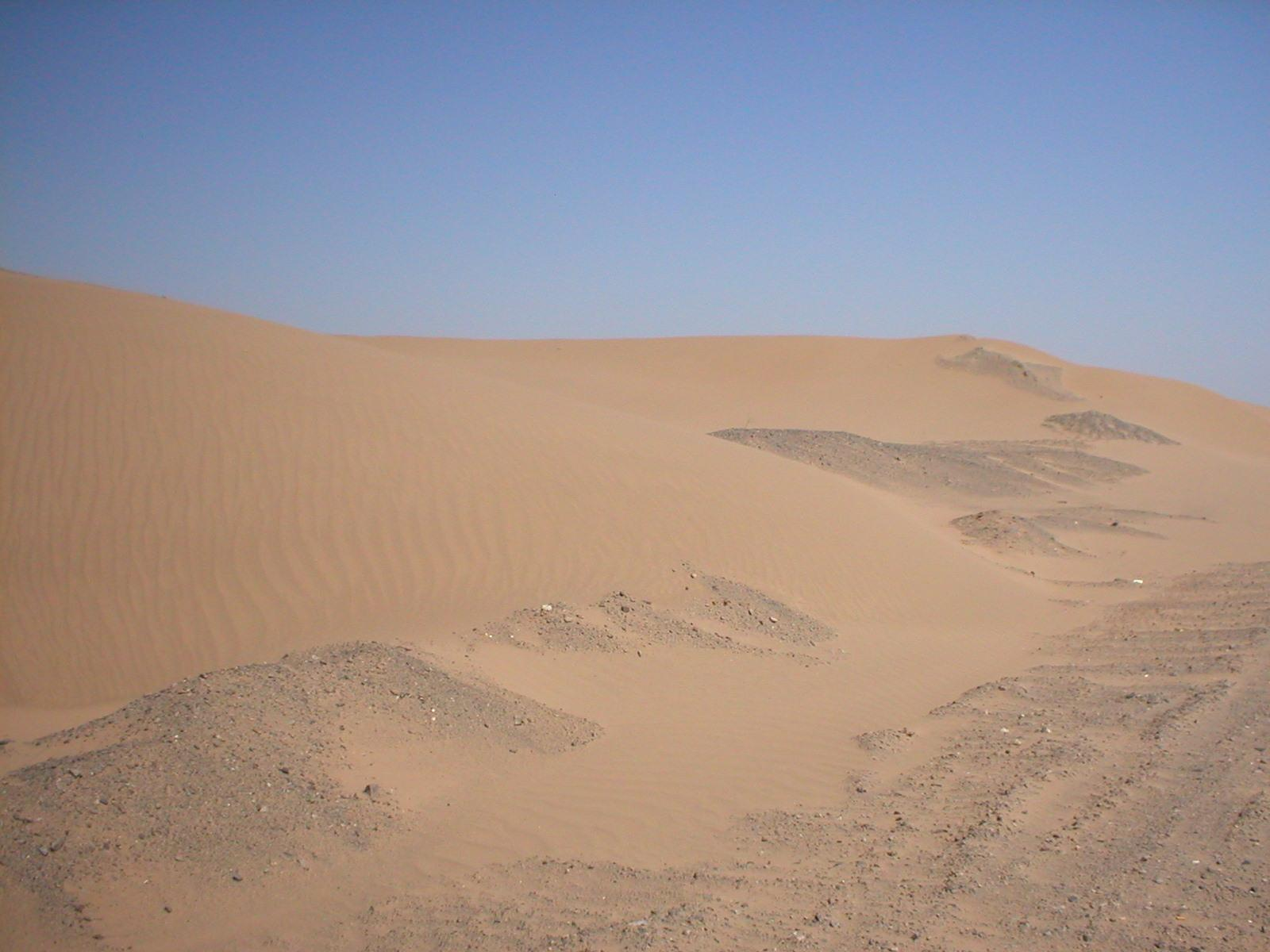 Los Grandes Médanos, cerca de la localidad de Encón, en el departamento 25 de Mayo, al extremo sureste de la provincia de San Juan, Argentina.